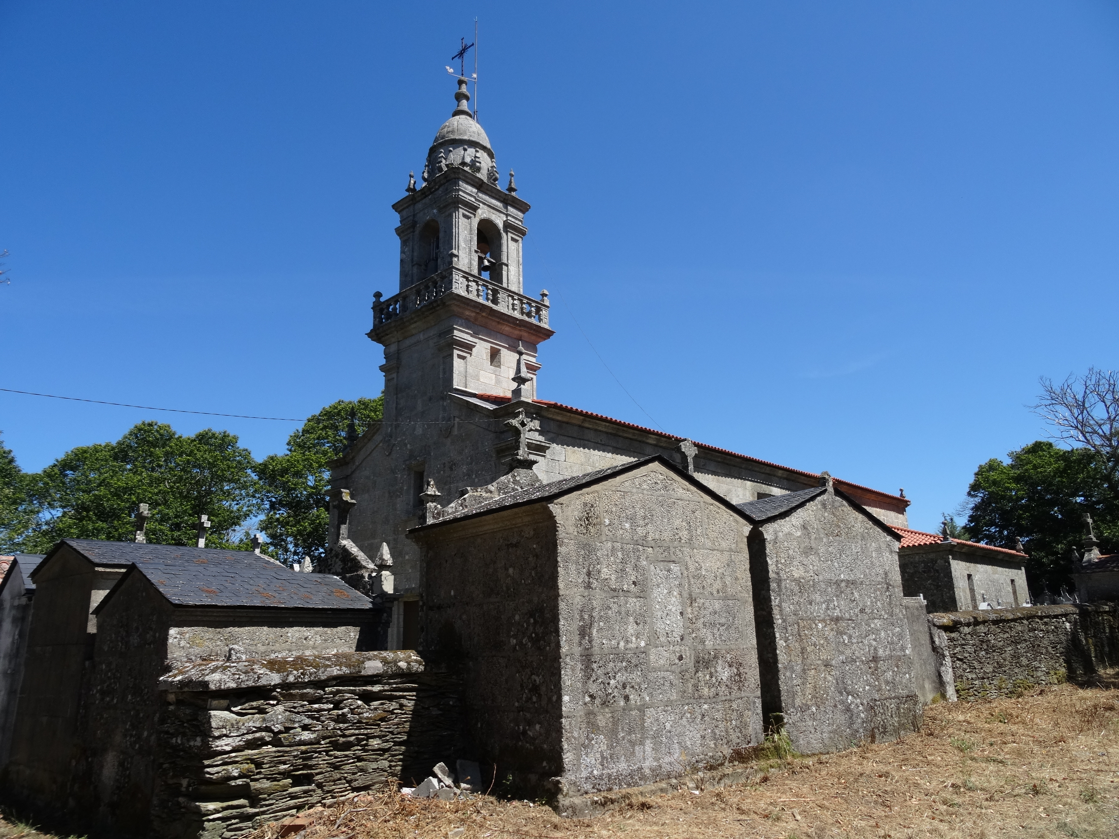 Igrexa de Sta. María de Riós, Ourense.